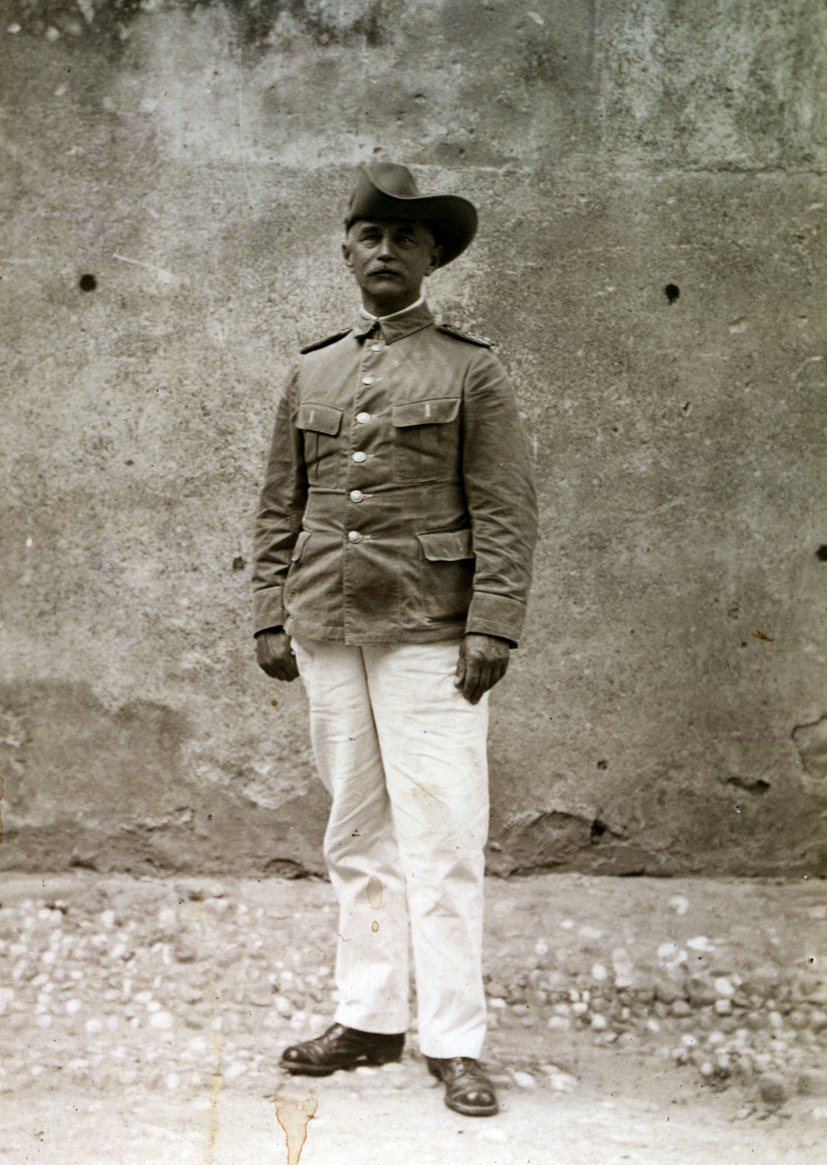 Major Hans-Georg Wilhelm von Doering als französischer Kriegsgefangener im Jahre 1916